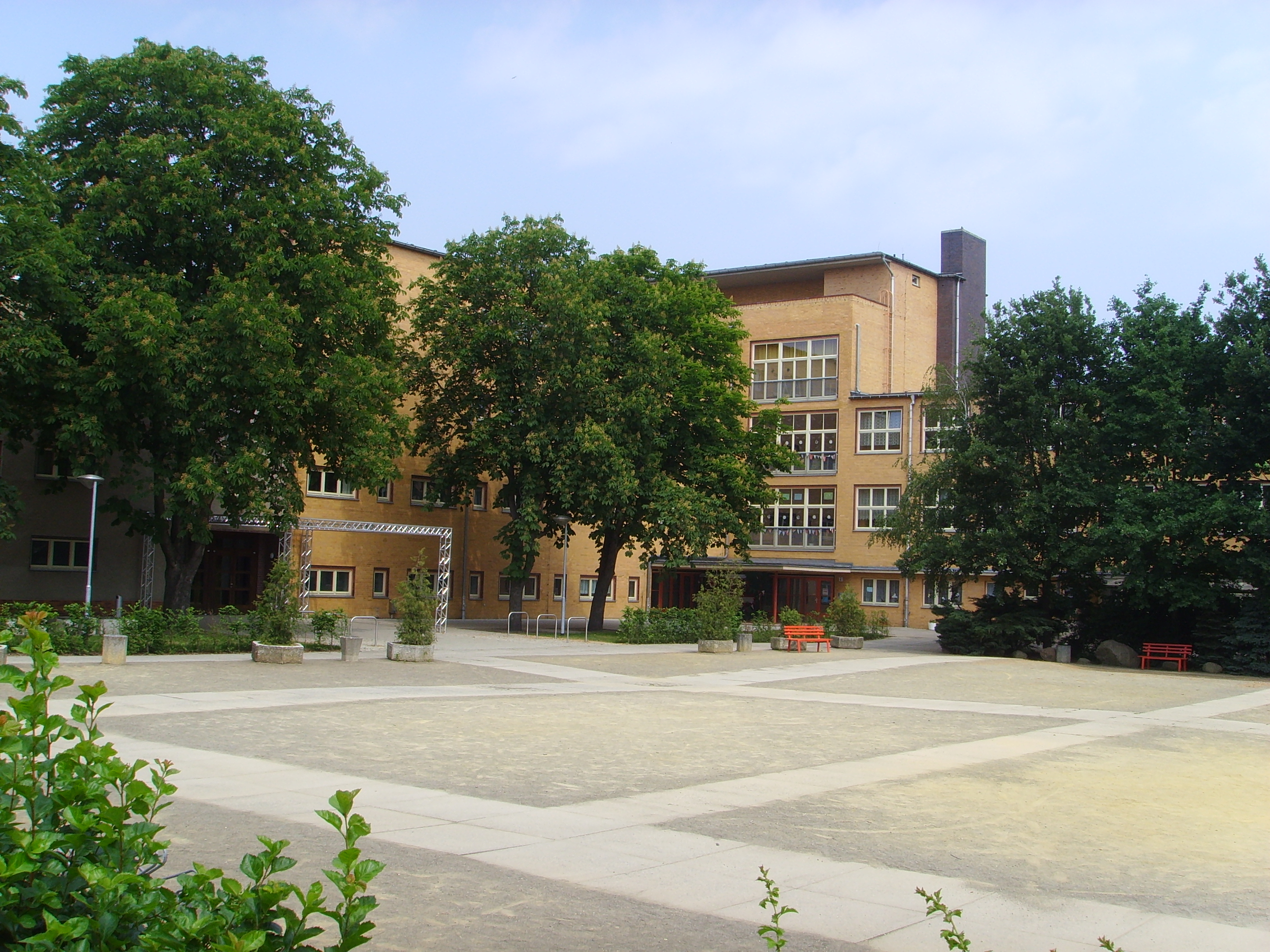 Walther-Rathenau-Schule in Senftenberg erbaut im Bauhausstil von Bruno und Max Taut